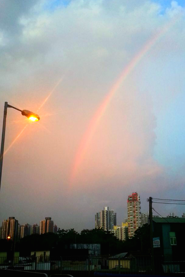 溱柏一帶視野廣闊，幸運彩虹特別容易遇見